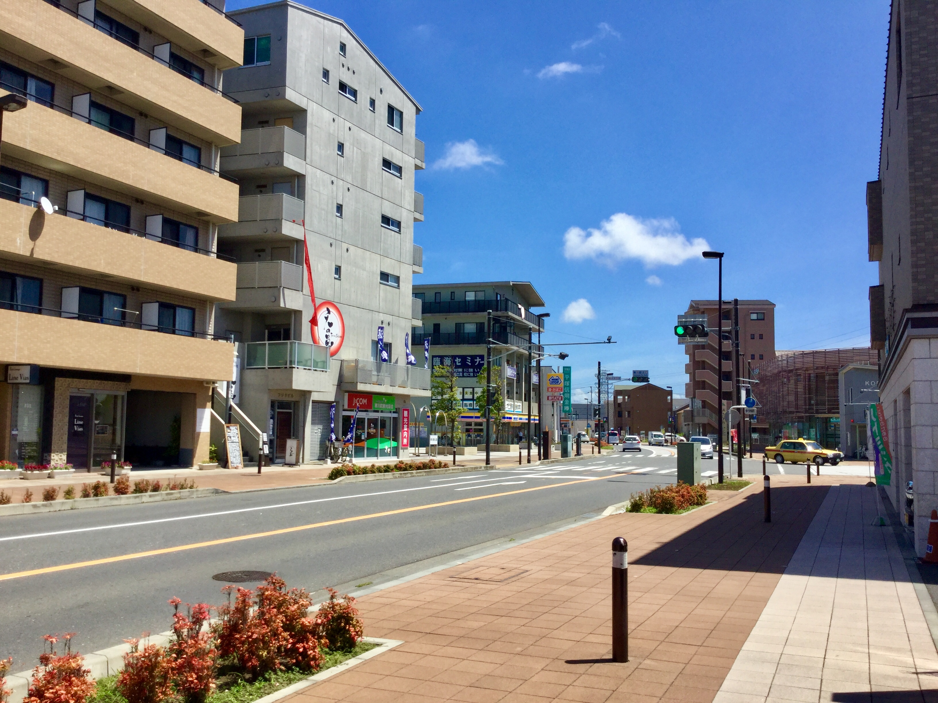 寒川駅北口駅前通り